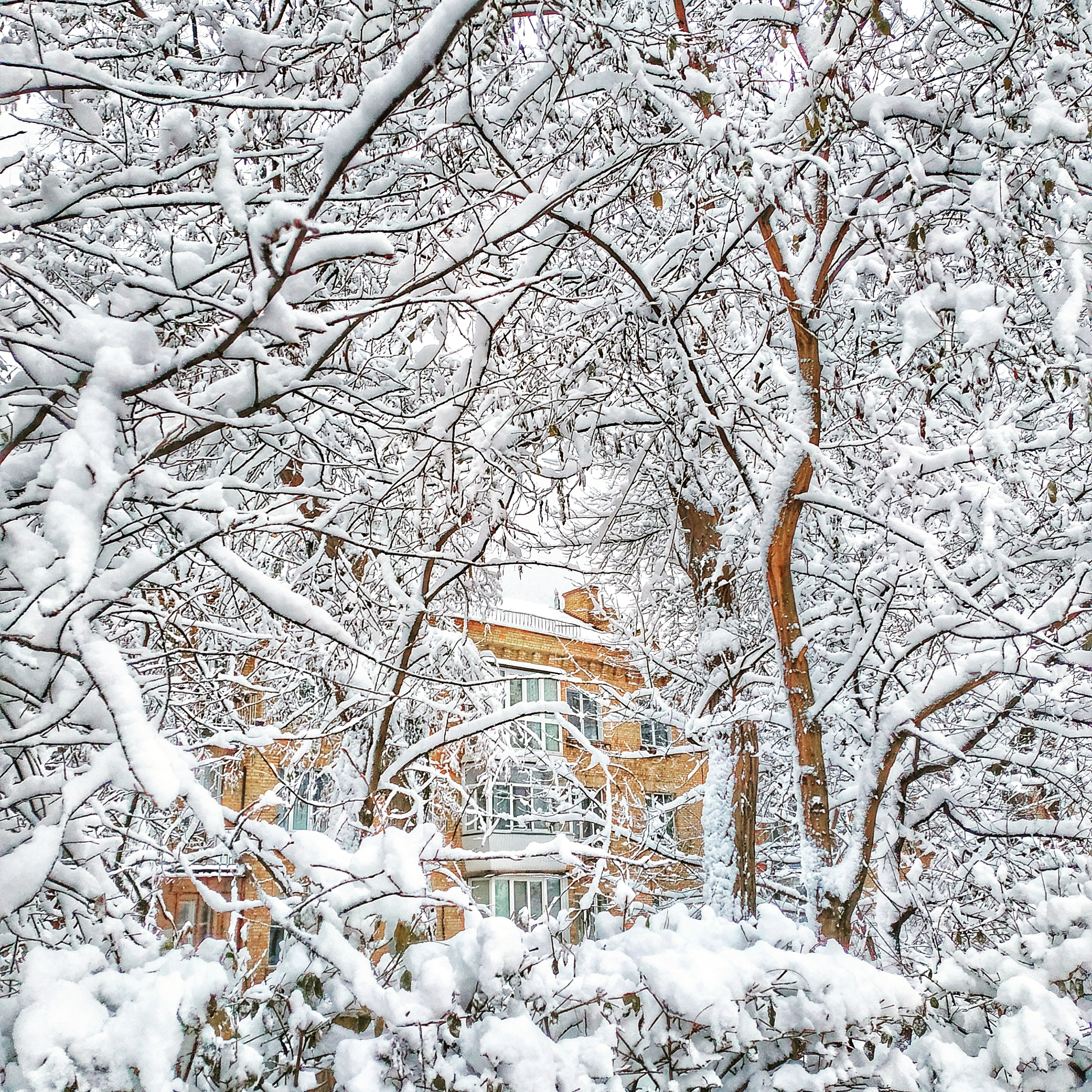 Снег в Киеве.